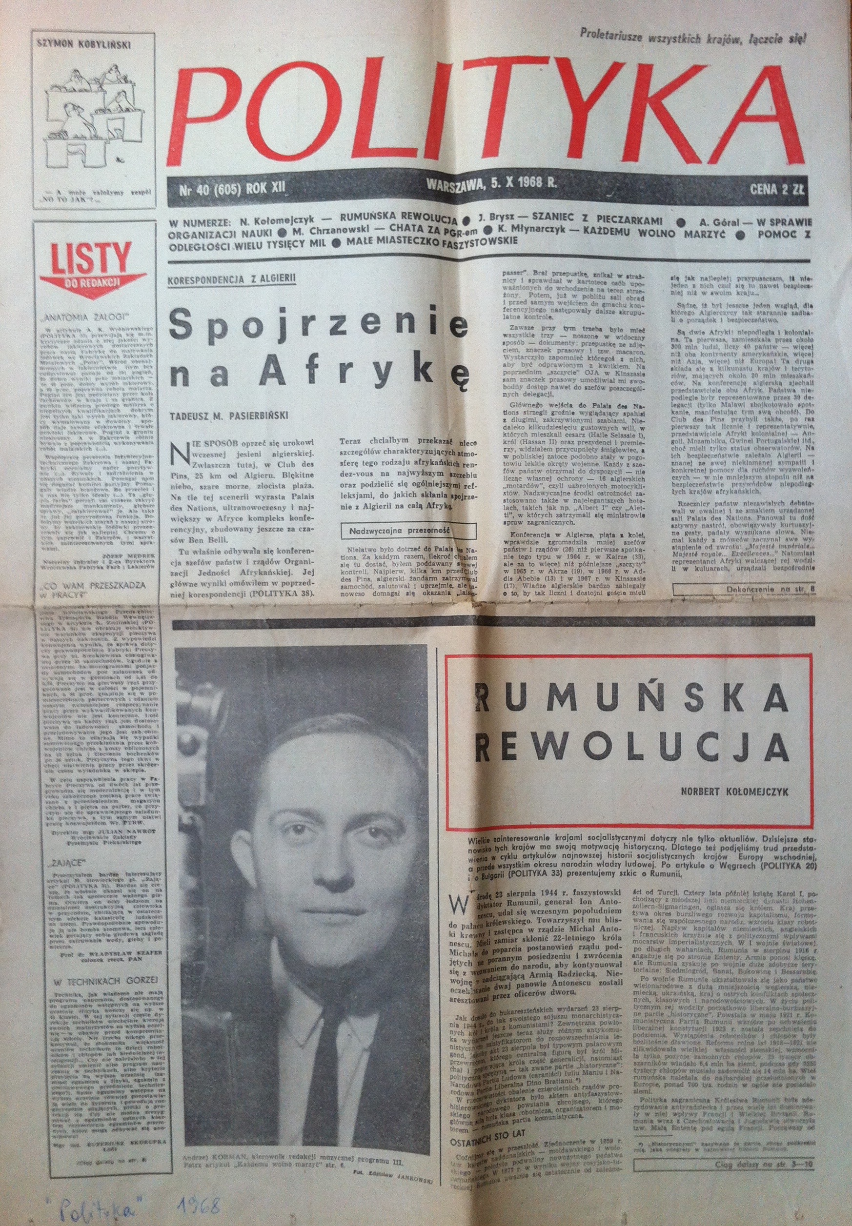 Andrzej Korman jako kierownik redakcji muzycznej Programu III Polskiego Radia na okładce "Polityki" z 5 października 1968